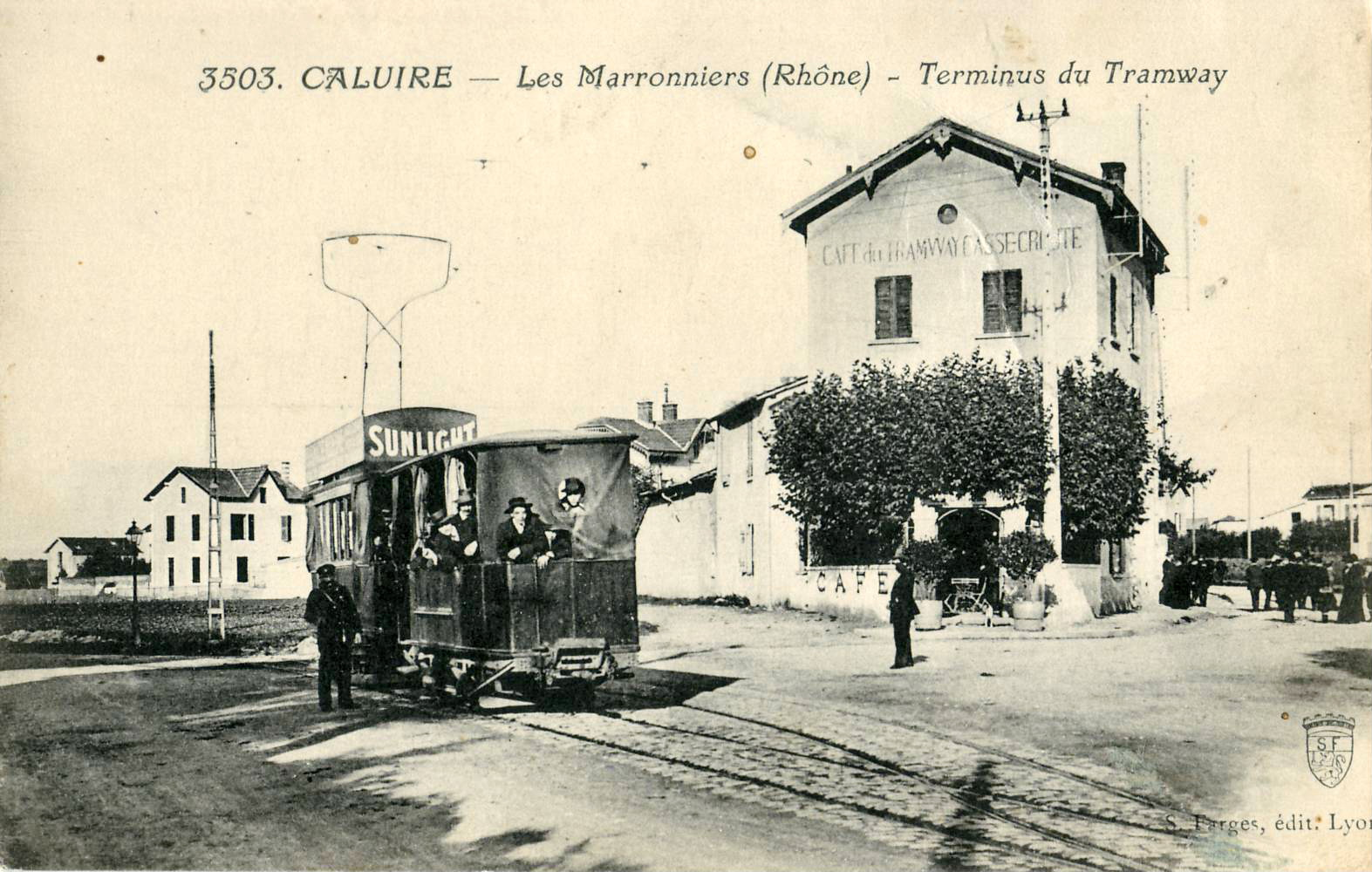 Carte postale ancienne éditée par Farges à Lyon, n°3503 : CALUIRE - Les Marronniers - Terminus du Tramway